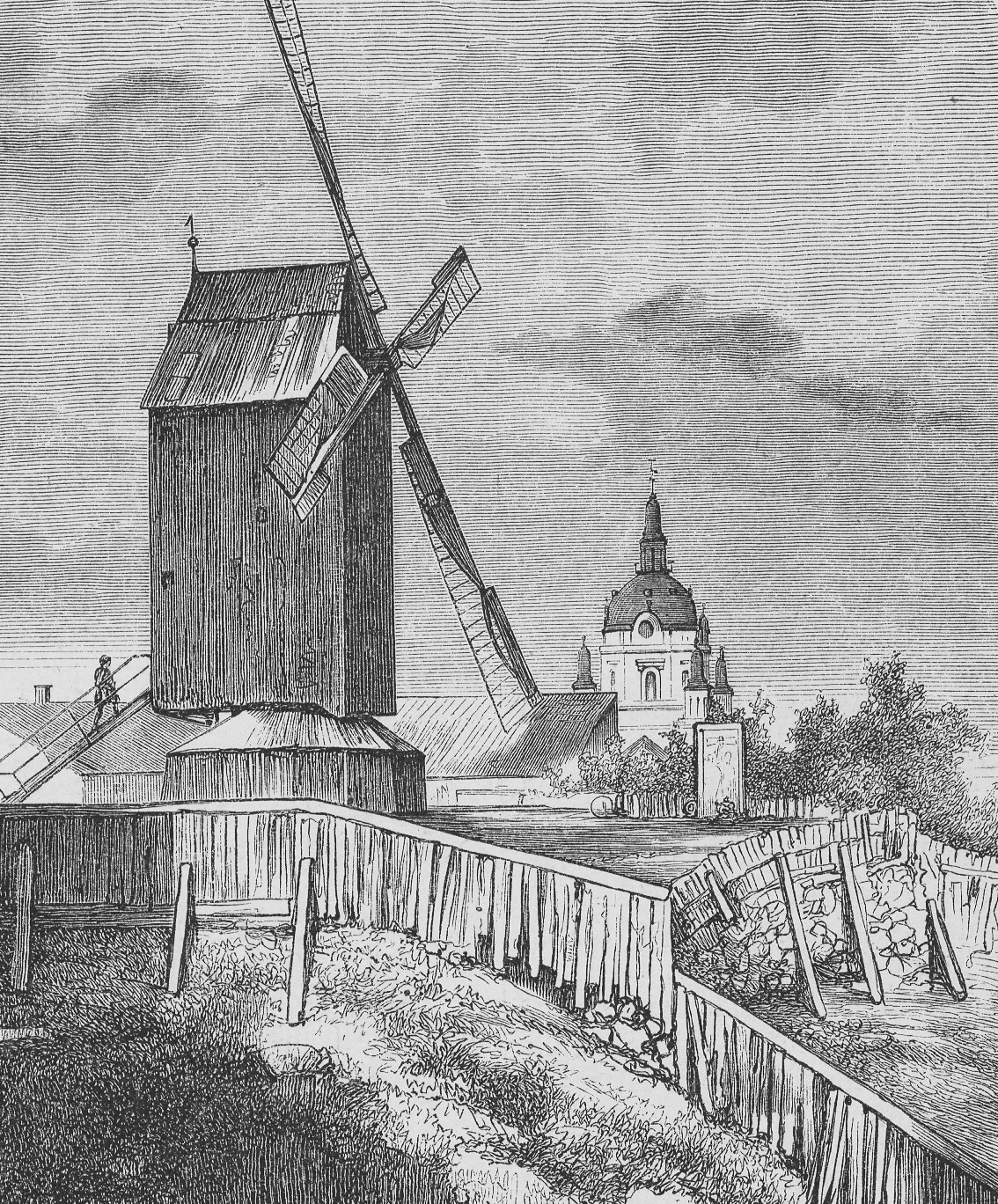 Qvarnbacken (Pelarbacken) med Käpplingemonumentet och Katarina kyrka. T.v. syns kvarnen "Finskan"